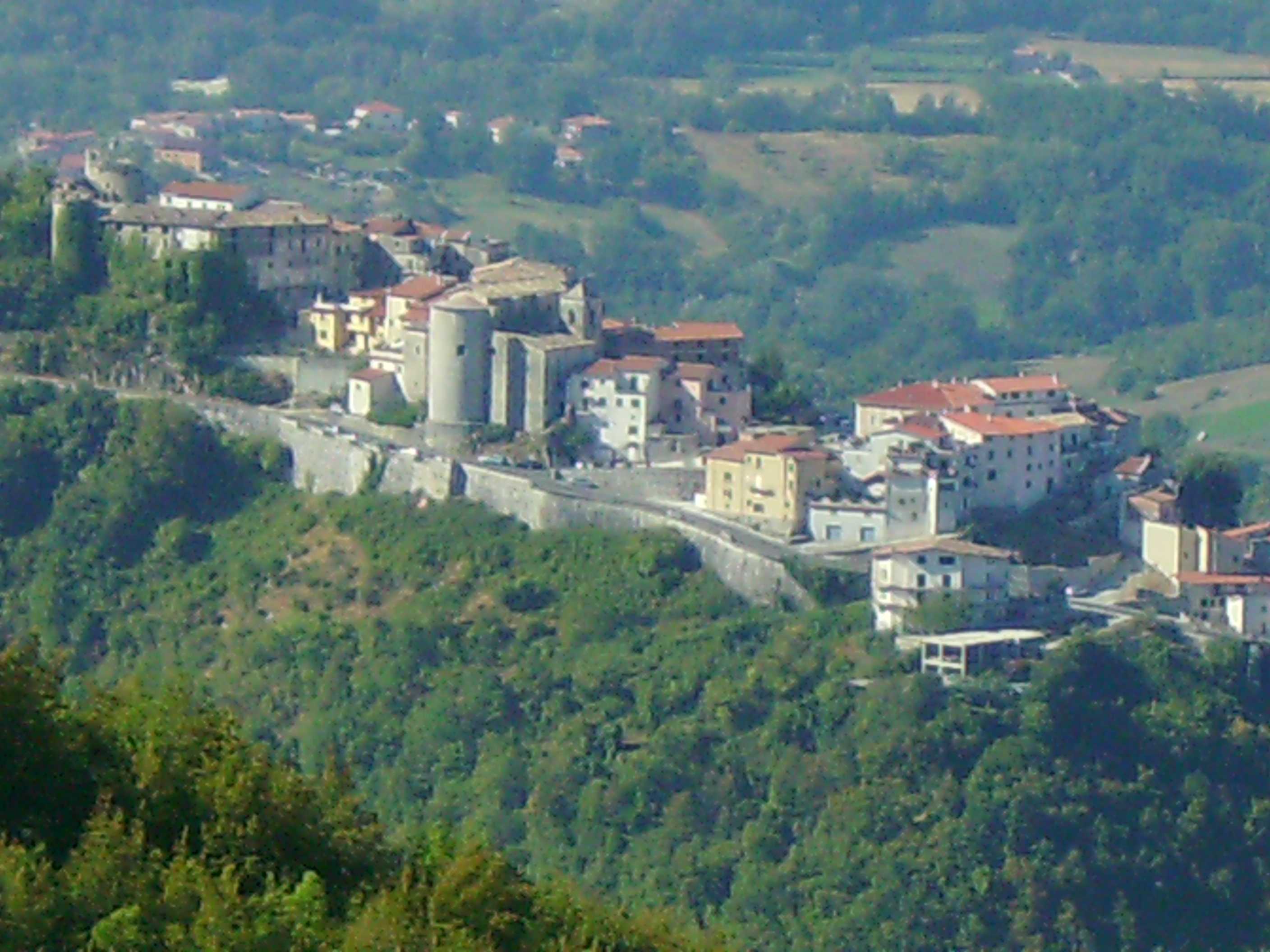 Panorama di Picinisco (FR) nel 2007